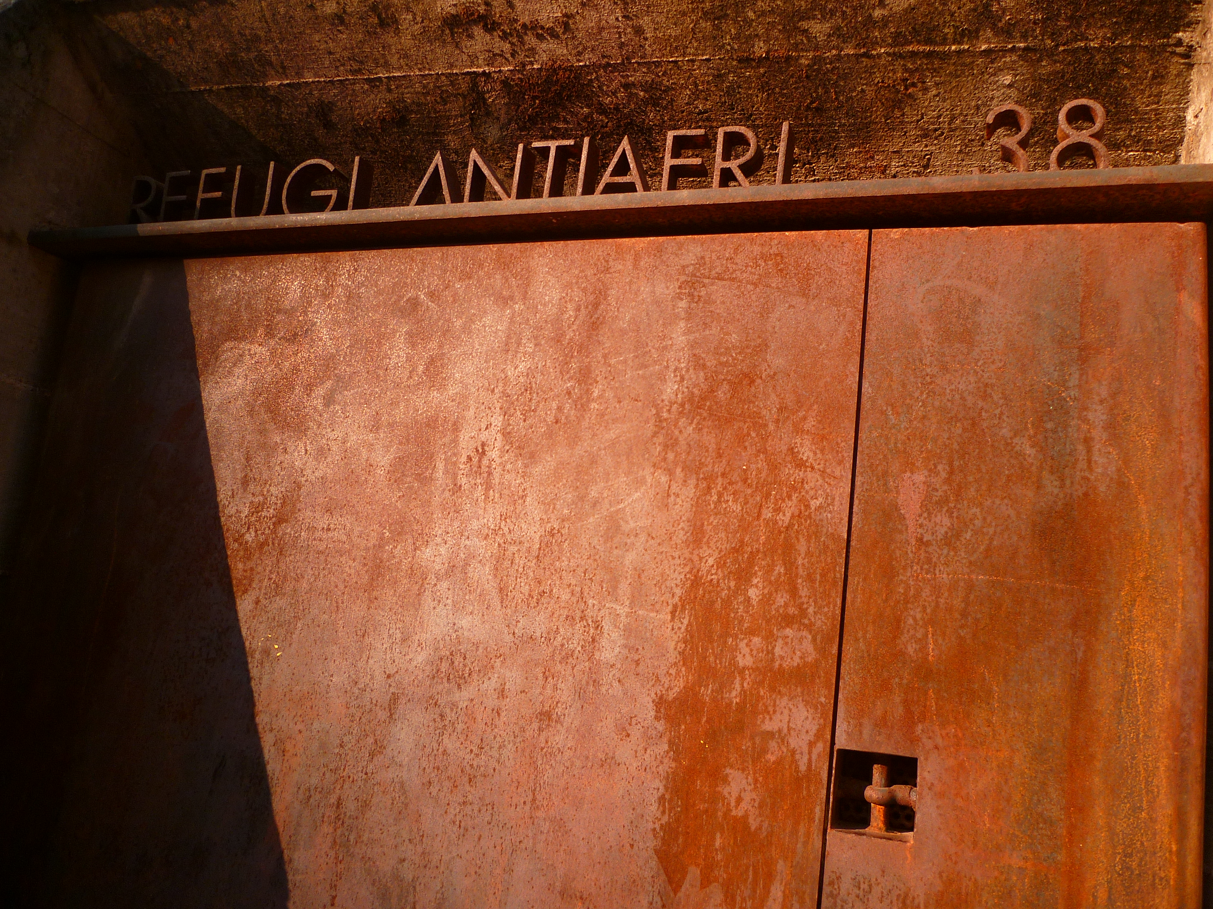 Girona (Catalunya, Espanya) : El refugi antiaeri del Jardí de la Infància.